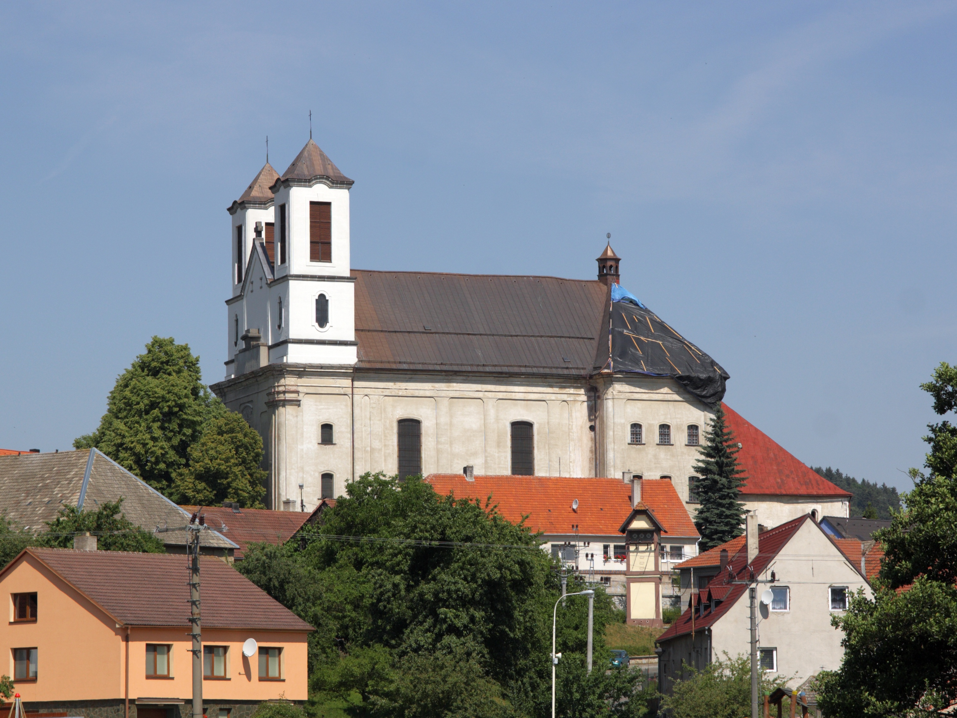 Přibyslavice (okres Třebíč) - kostel Narození Panny Marie, pohled od východu.